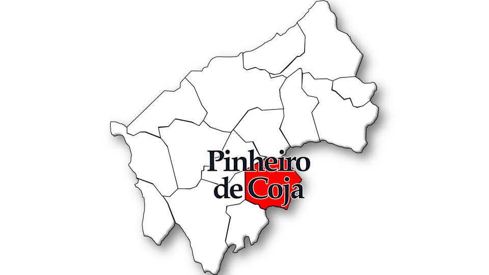 População